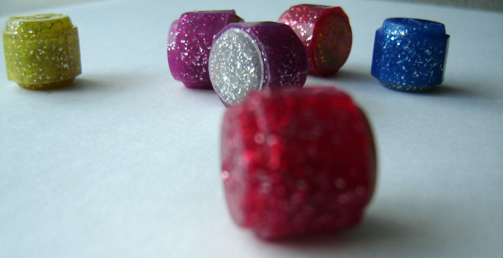 Korean Gonggi stones